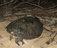 Penyu hijau mulai mencari tempat untuk bertelur di Pulau Anano, Kepulauan Wakatobi, Sulawesi Tenggara. Author: Asti Wasistini